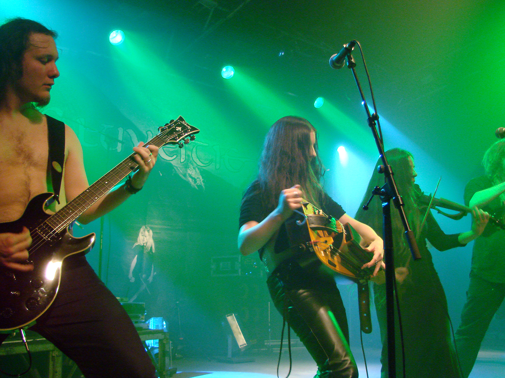 Eluveitie au Cernunnos Fest 07, le 16/12/07 à la Locomotive, Paris.